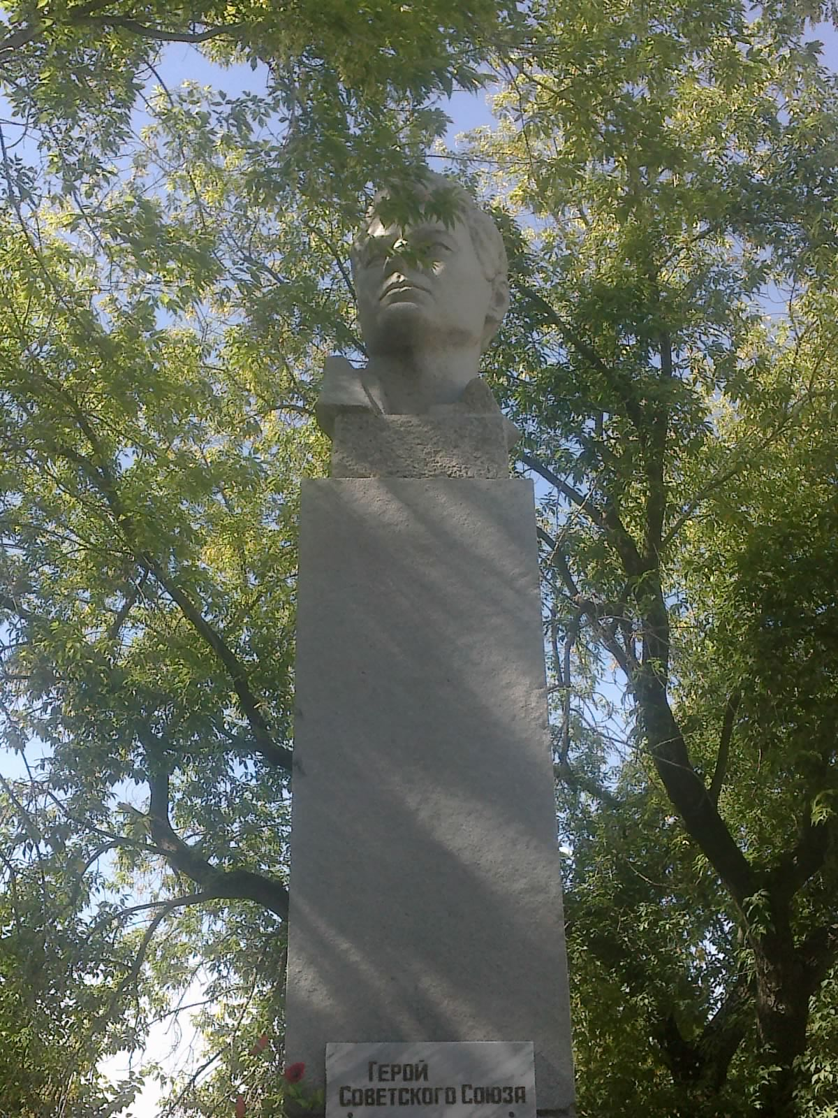 Памятник Г. П. Кунавину в Богдановиче